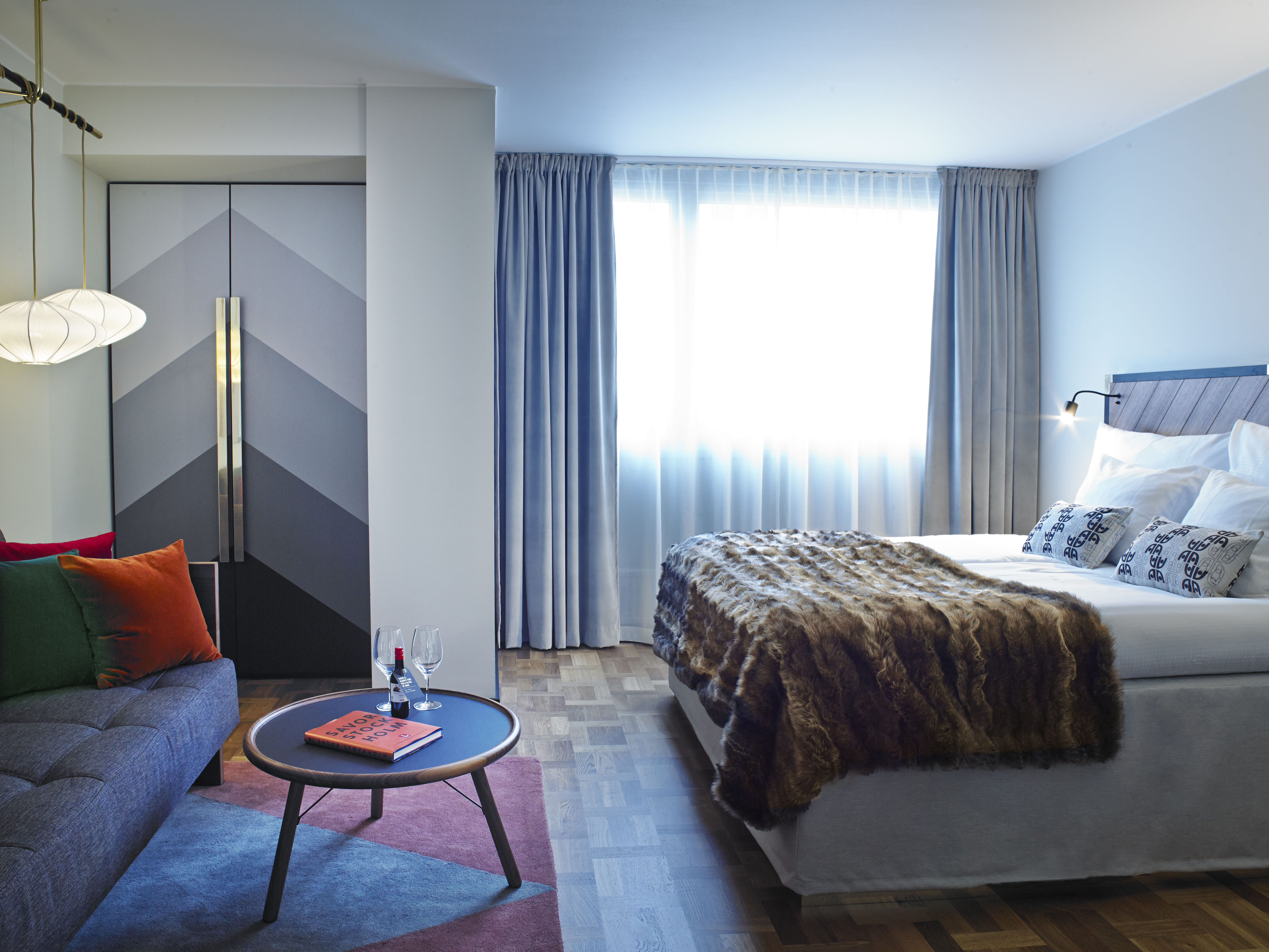 Inredning i superiorrum/dubbelrum på hotellet.